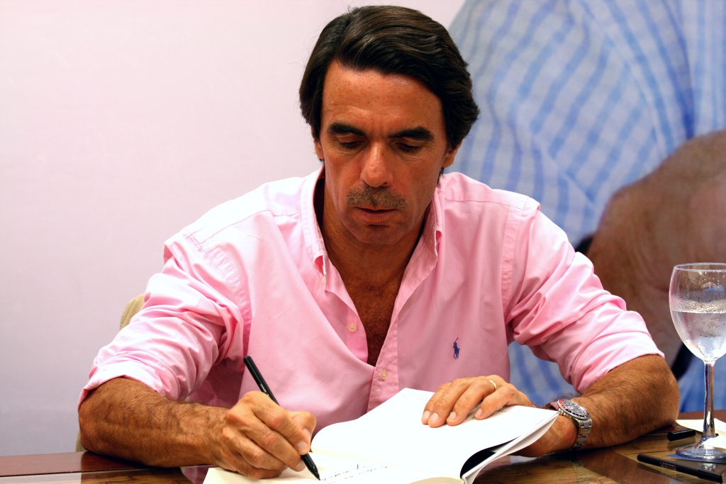 El ex-Presidente del Gobierno español, José María Aznar, presentó su libro "Cómo salir de la crisis" en el centro comercial El Corte Inglés el martes 14 de julio de 2009, en Vigo (Galicia, España). The ex-president of the Spanish Government, Jose Maria Aznar, presented his book "How went out of the crisis" in the commercial center El Corte Inglés on Tuesday, the 14th of July, 2009, in Vigo (Galicia, Spain).